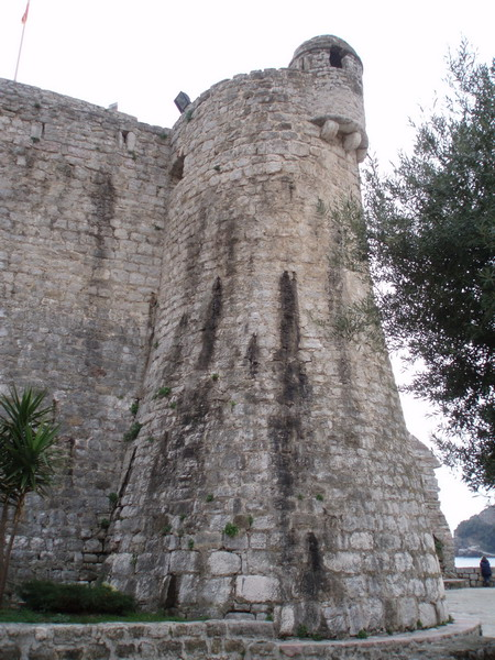 Budva citadela